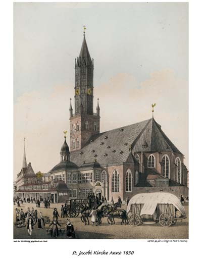 Hamburg,Hauptkirche Sankt Jacobi (Hamburg) 1830 This is a photograph of an architectural monument.